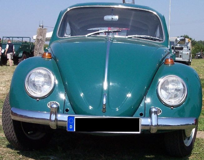 VW 1300 KÃ¤fer, eigenes Bild, GFDL